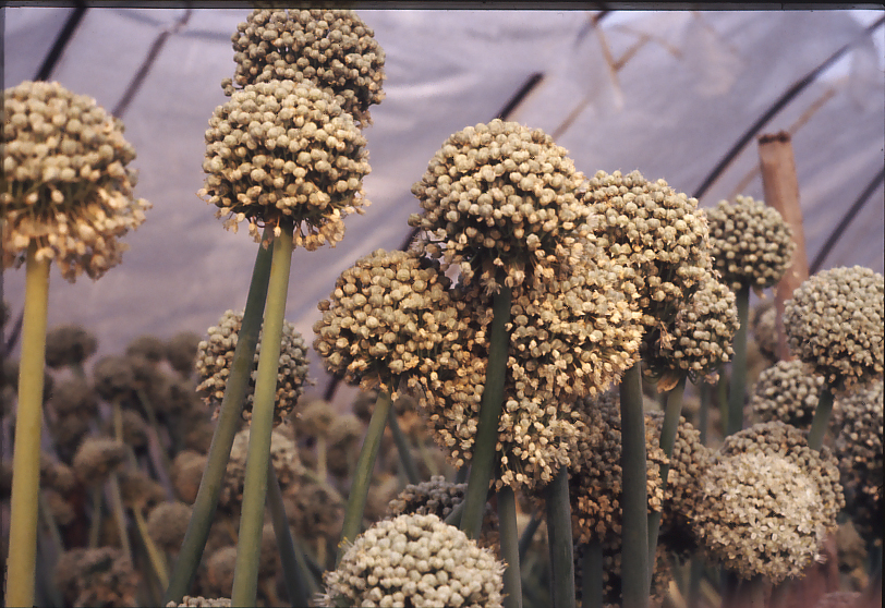 Frøproduksjon av løk